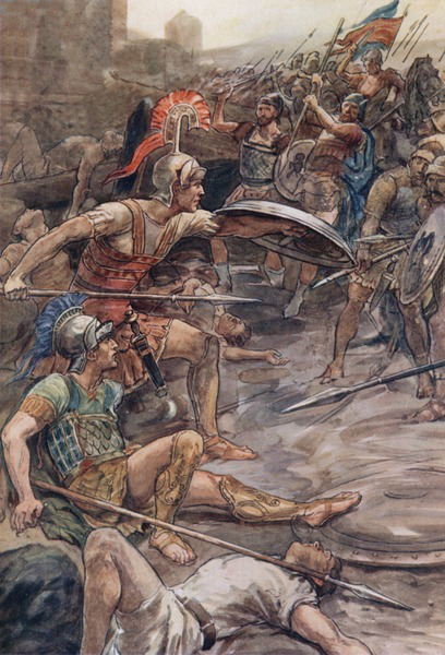 Epaminonda difende Pelopida, illustrazione tratta da "Plutarch's Lives for Boys and Girls, raccontati da W.H. Weston, London 1910", litografia a colori.